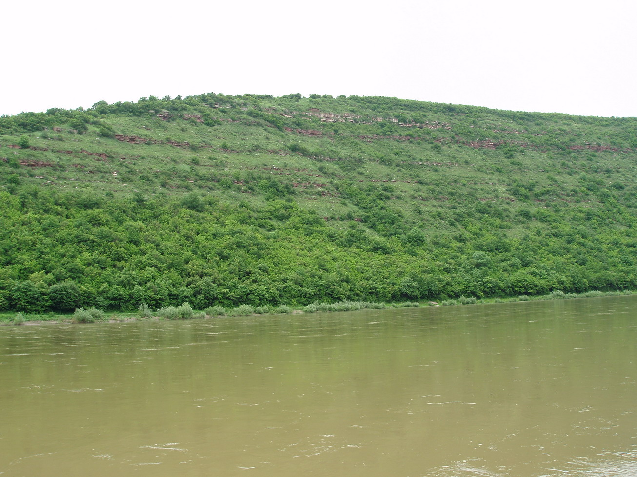 Dniester River Canyon, western Ukraine.